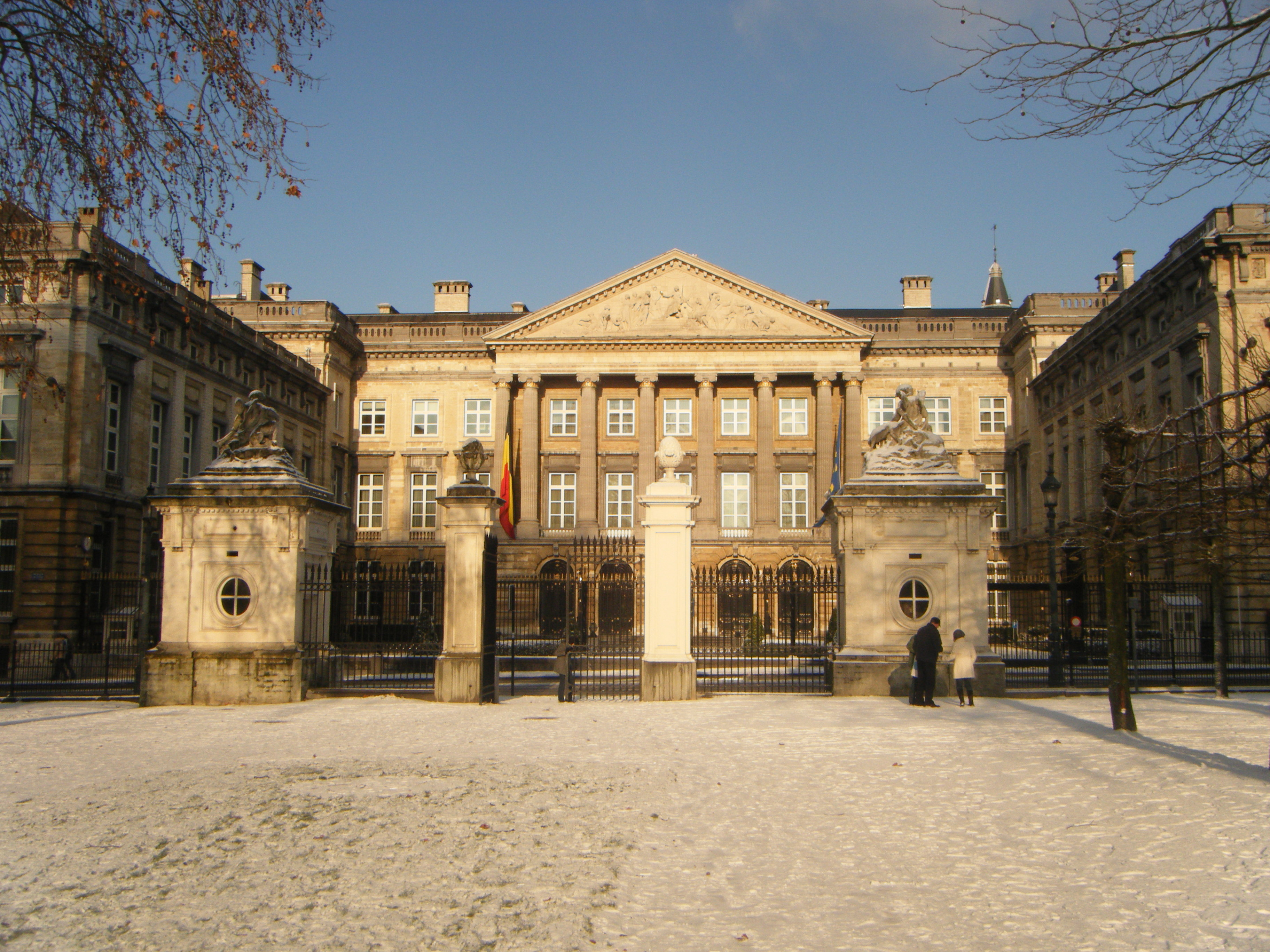 Palais de la Nation, Bruxelles